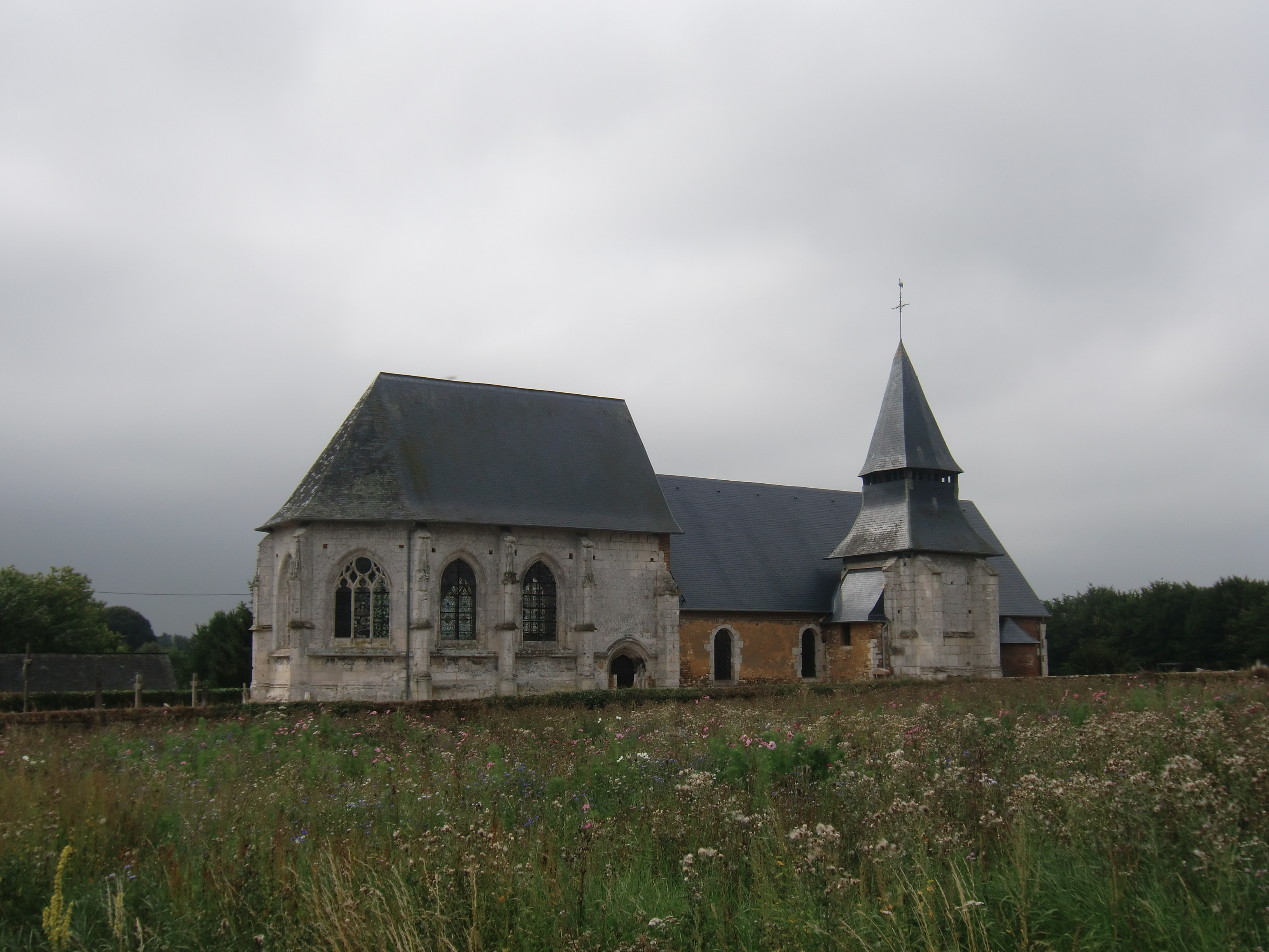 Église Saint-Ouen de Bourgtheroulde-Infreville, Eure, Normandie, France)